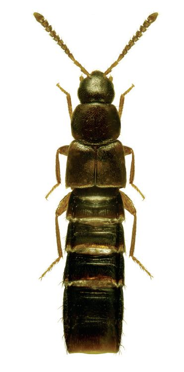 Schistoglossa pseudocampbelli